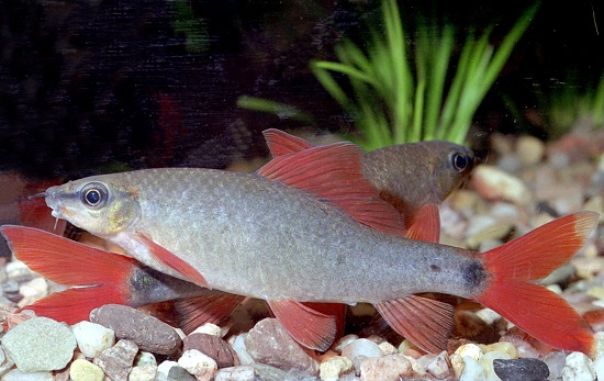 das Bild szeigt einen Zügelfransenlipper (Epalzeorhynchos frenatus).